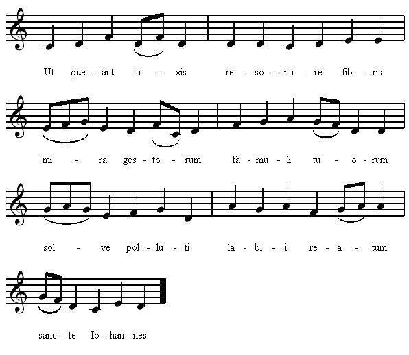 Hymne voor Johannes de Doper